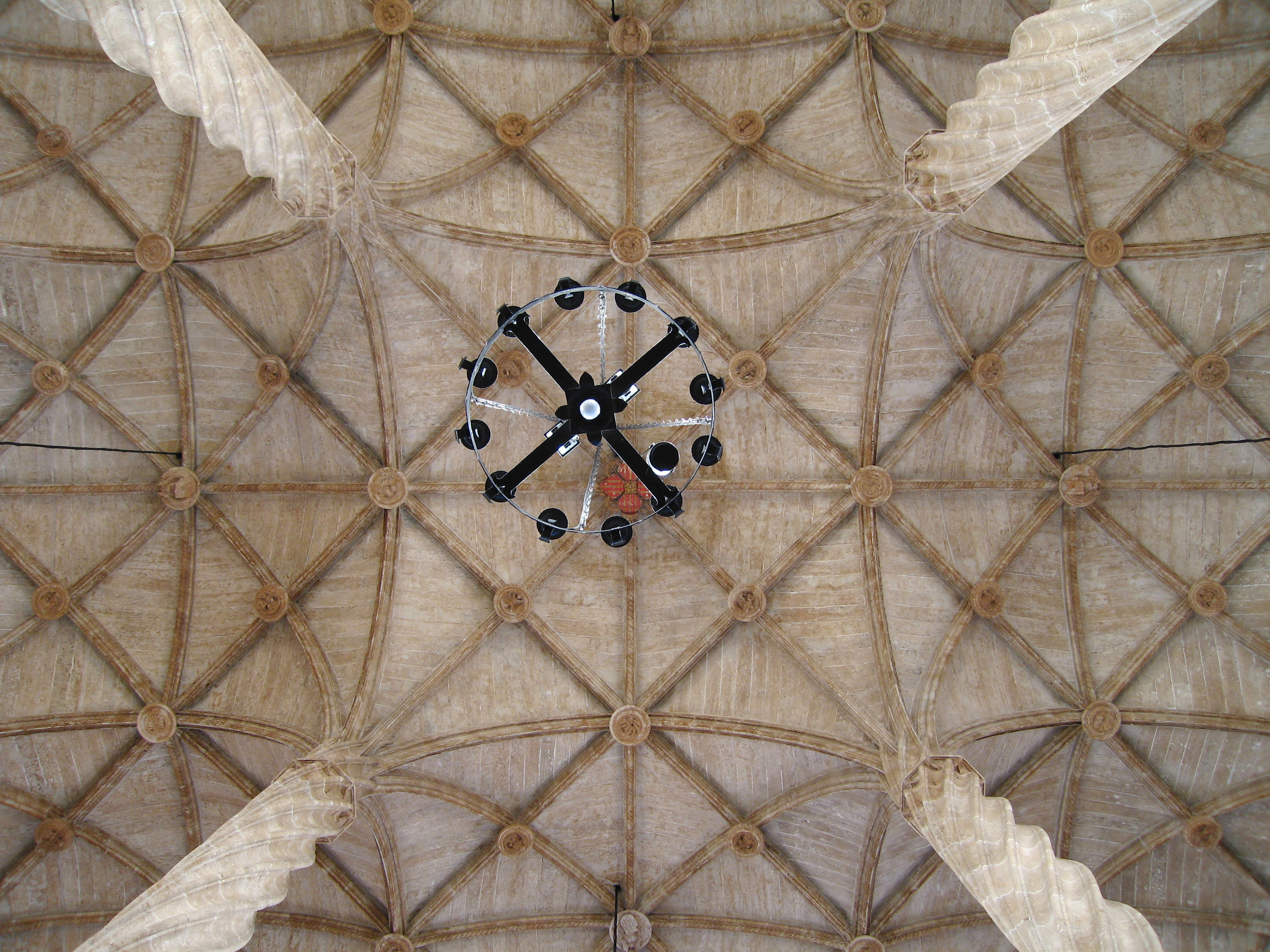 Sostre de la Llotja de la Seda